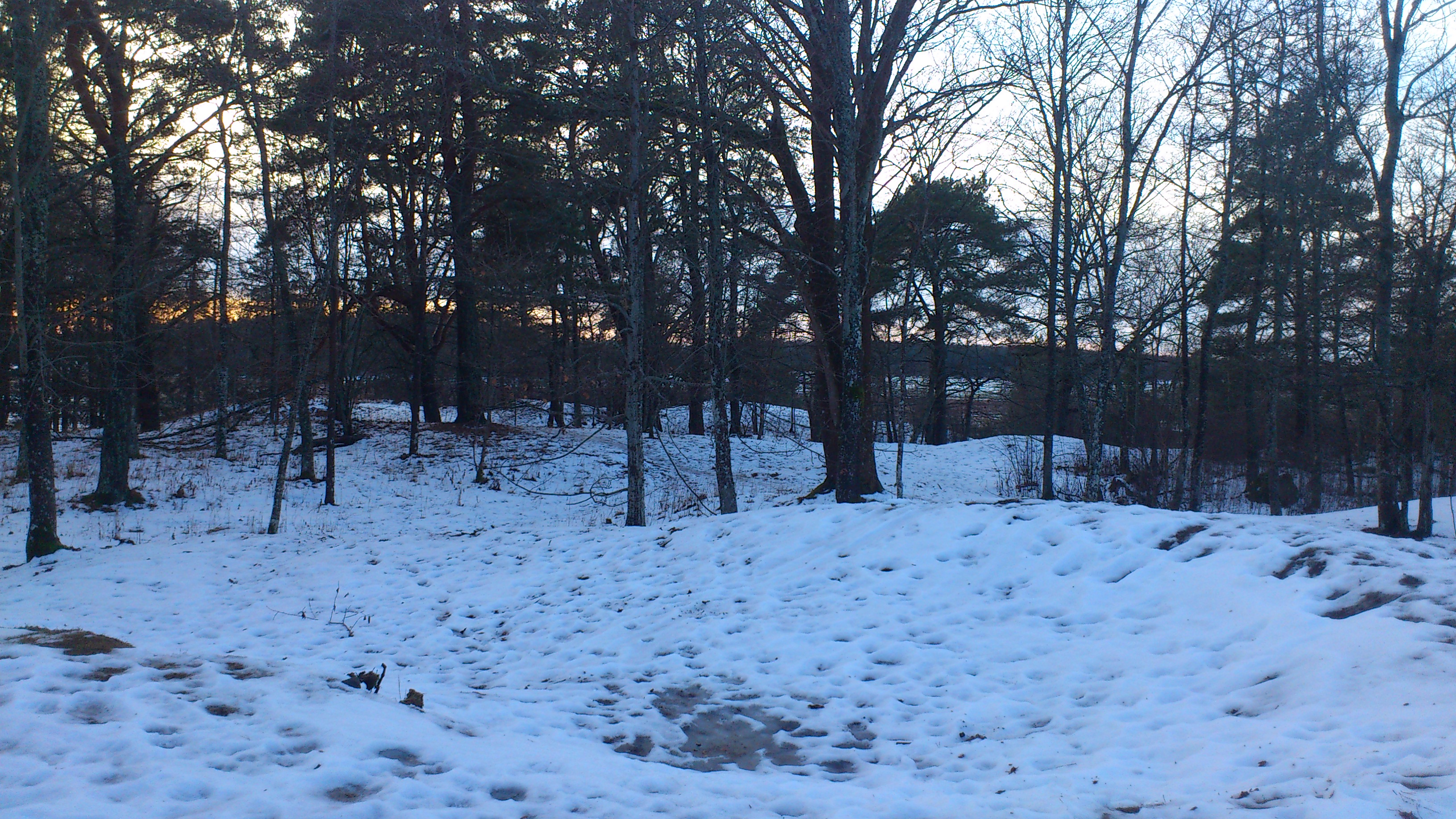 Gravfält från järnåldern i Stabby Uppsala